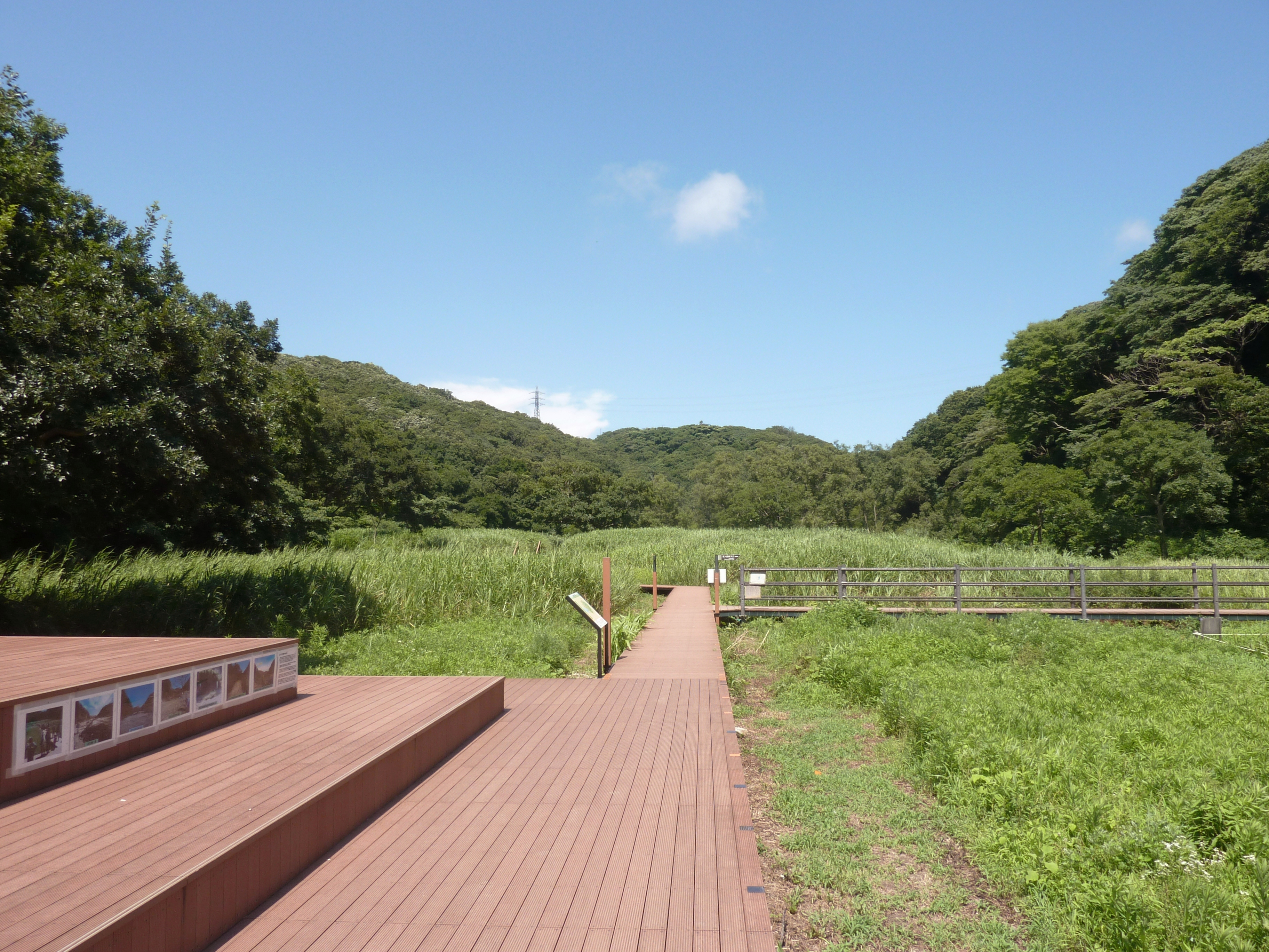 神奈川県三浦市・「小網代の森」浦の川下流域。オギやヨシなどが茂る。